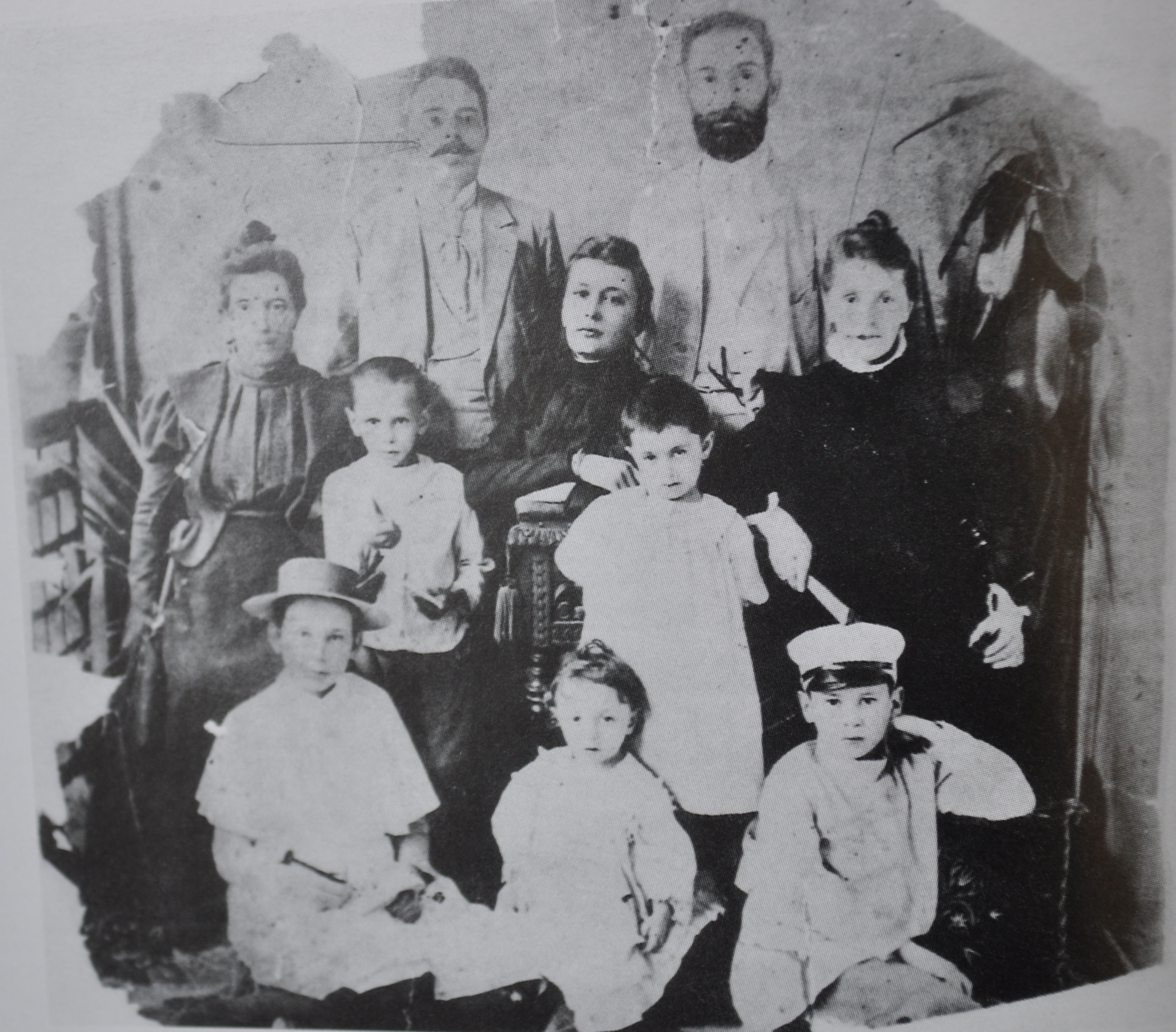 Familia Spielrein en 1896. En primer plano aparece Sabina, Emilia y Jan. La madre, Eva e Isaac en la fila del medio, a la izquierda. Atrás a la izquierda, el padre de sabina y a su lado está probablmente el Dr. Moishe Lublinsky. Se desconoce quienes son el resto de las personas.